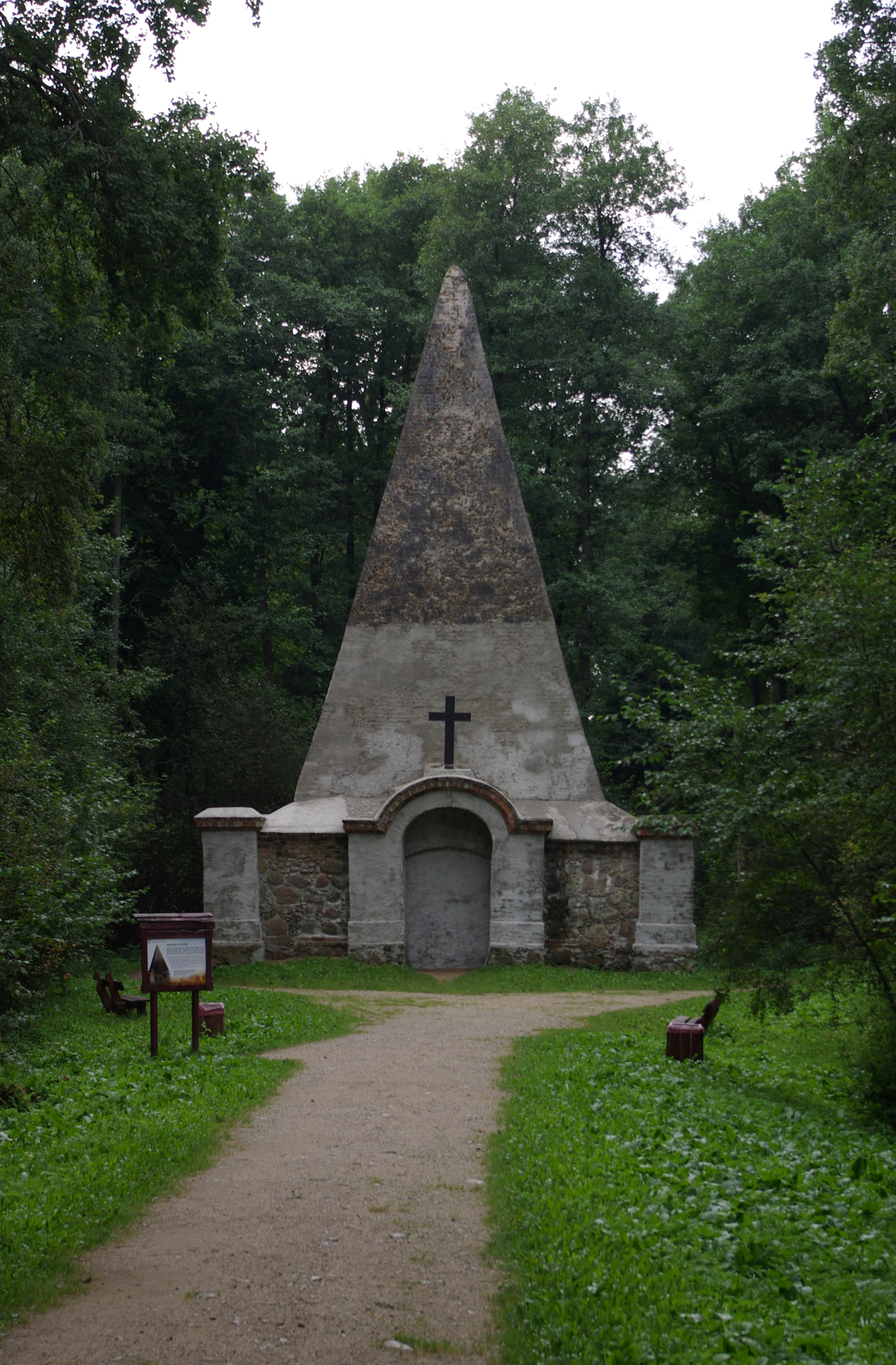 Piramida w Rapie